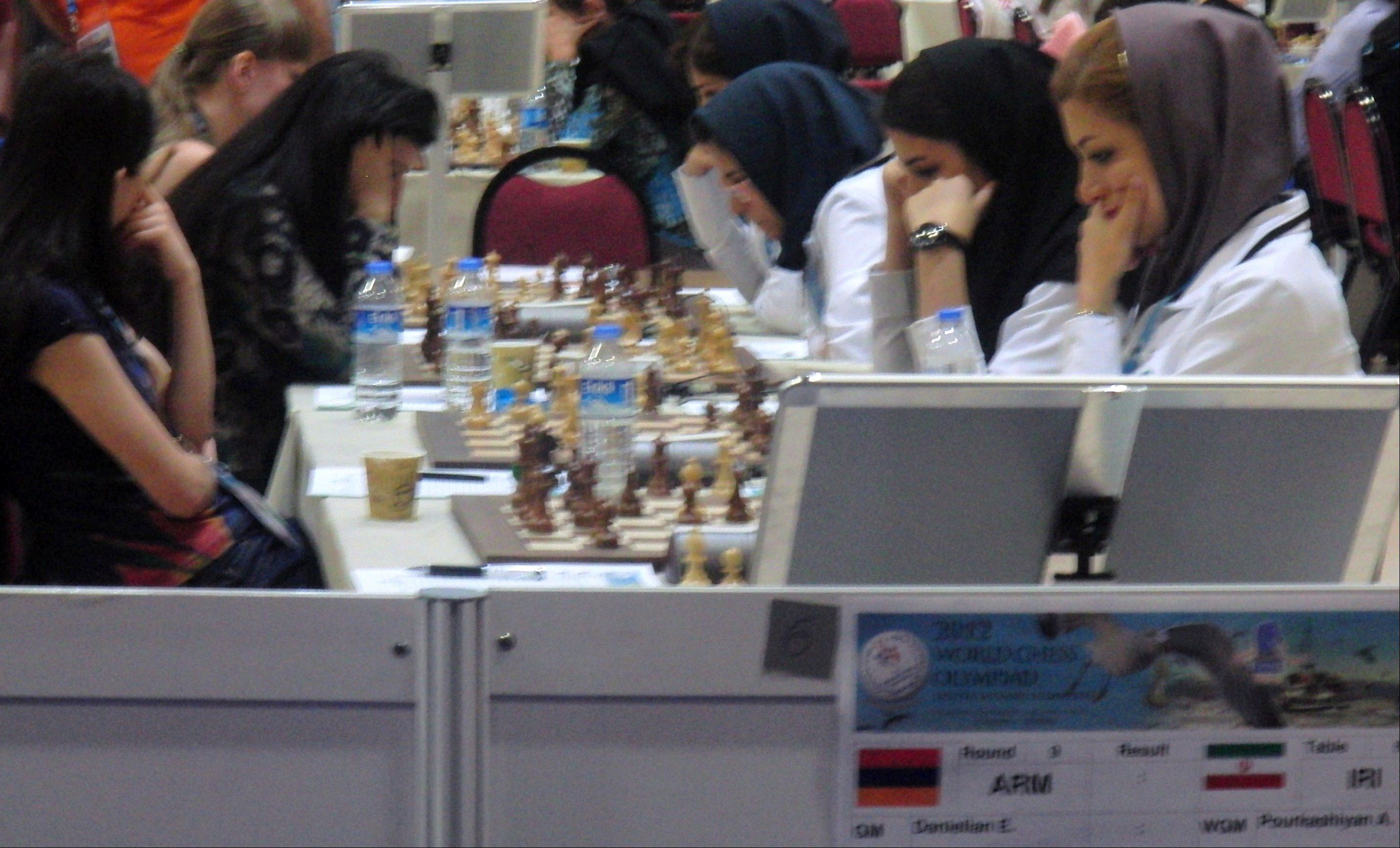 Armenien - Iran, Schacholympiade 2012 in Istanbul. Am ersten Brett spielen GM Elina Danieljan und WGM Atousa Pourkashiyan.